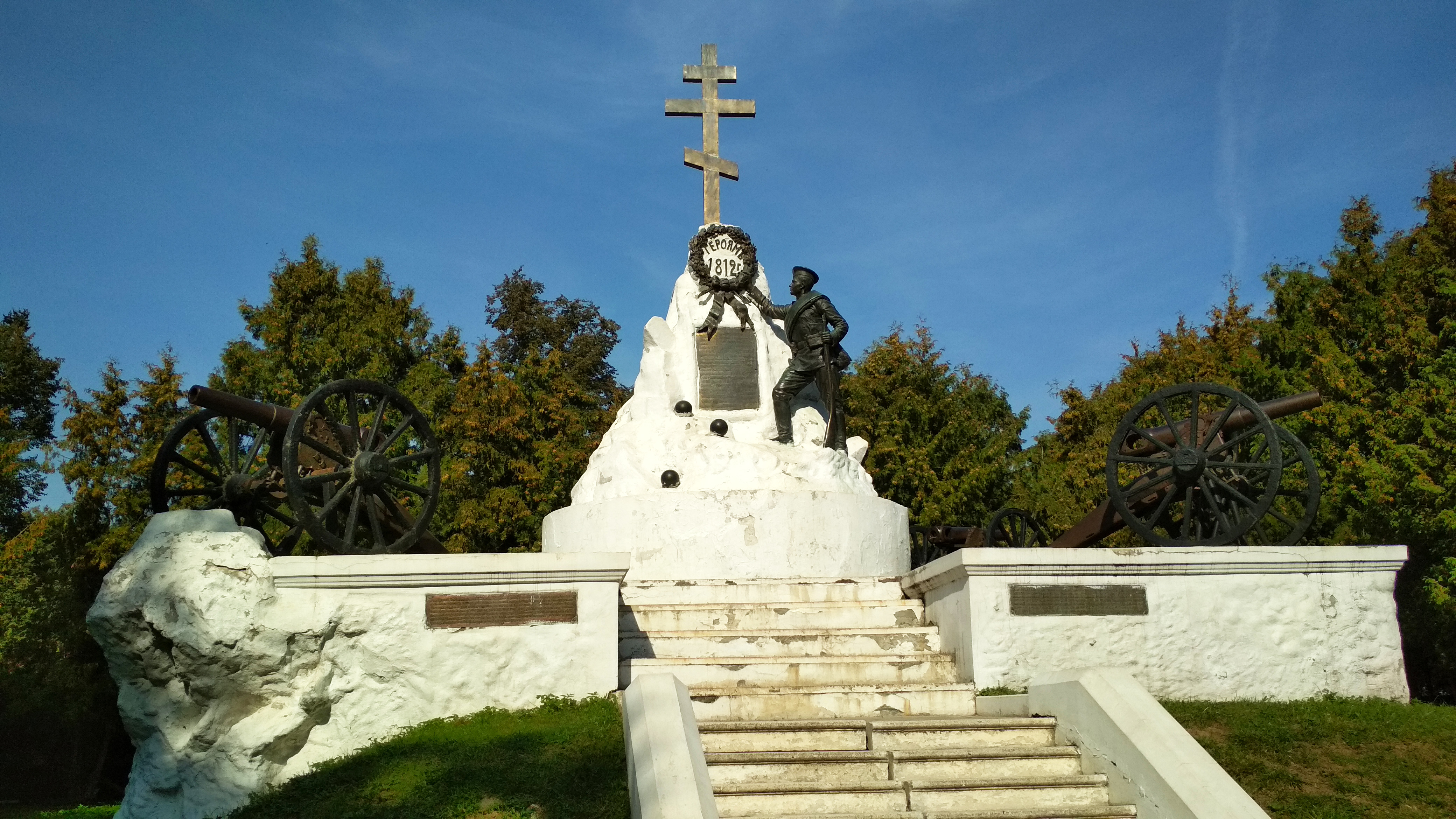 Памятник Героям 1812 года в Малоярославце